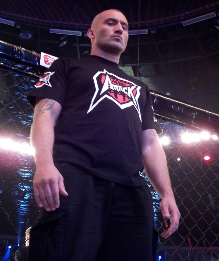 Zdjęcie zrobione podczas gali mieszanych sztuk walki MMA Attack 2 w katowickim Spodku.